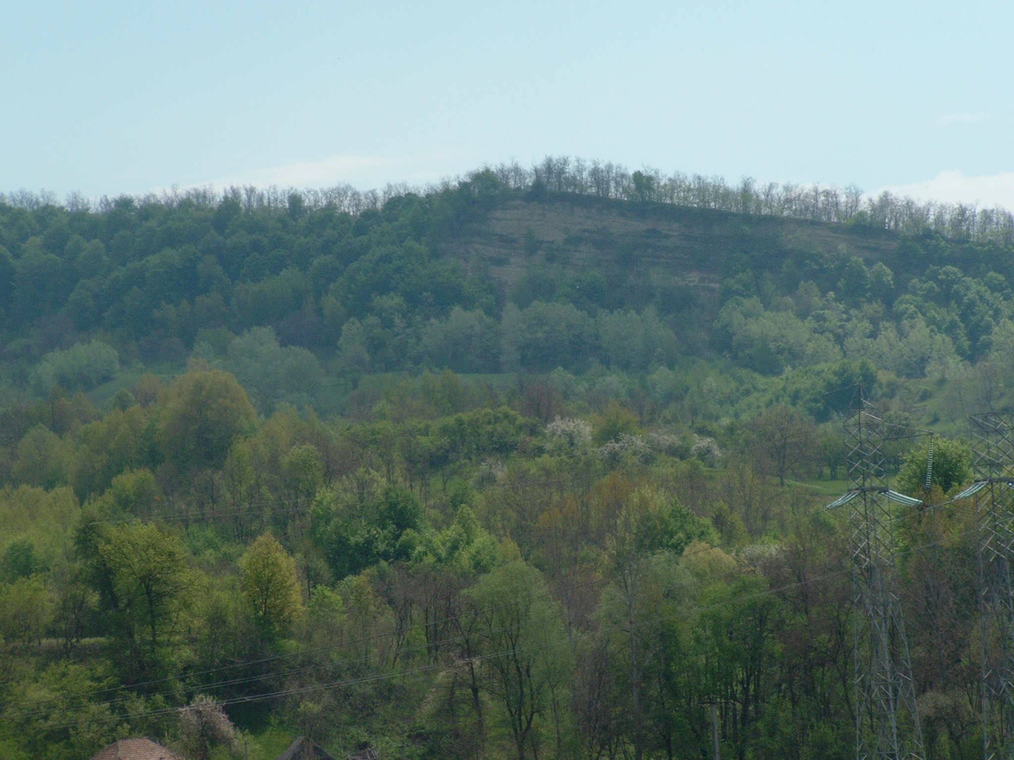 Depicted place: Foleștii de Jos